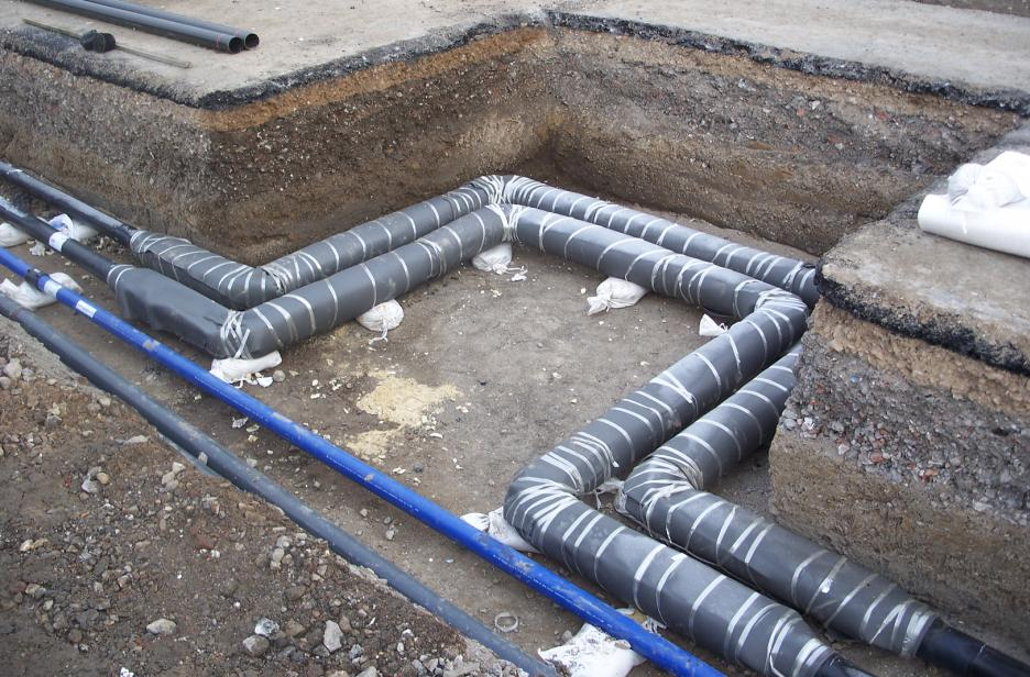 U-Bögen zum Längenausgleich in erdverlegten Fernwärmeleitungen aus Kunststoffmantelverbundrohr, mit Dehnpolstern umwickelt